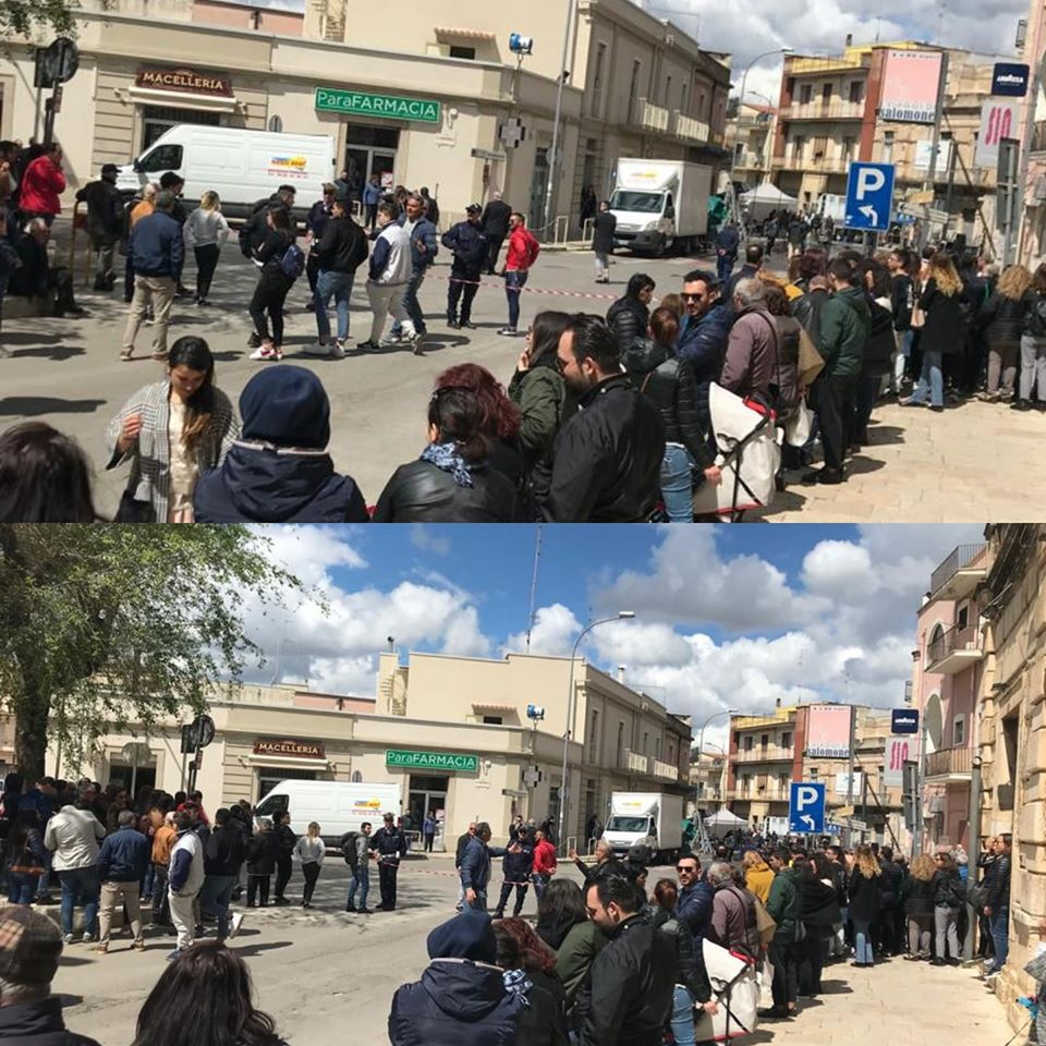 Riprese del film "Tolo Tolo" di Checco Zalone (Acquaviva delle Fonti, 30 aprile 2019)